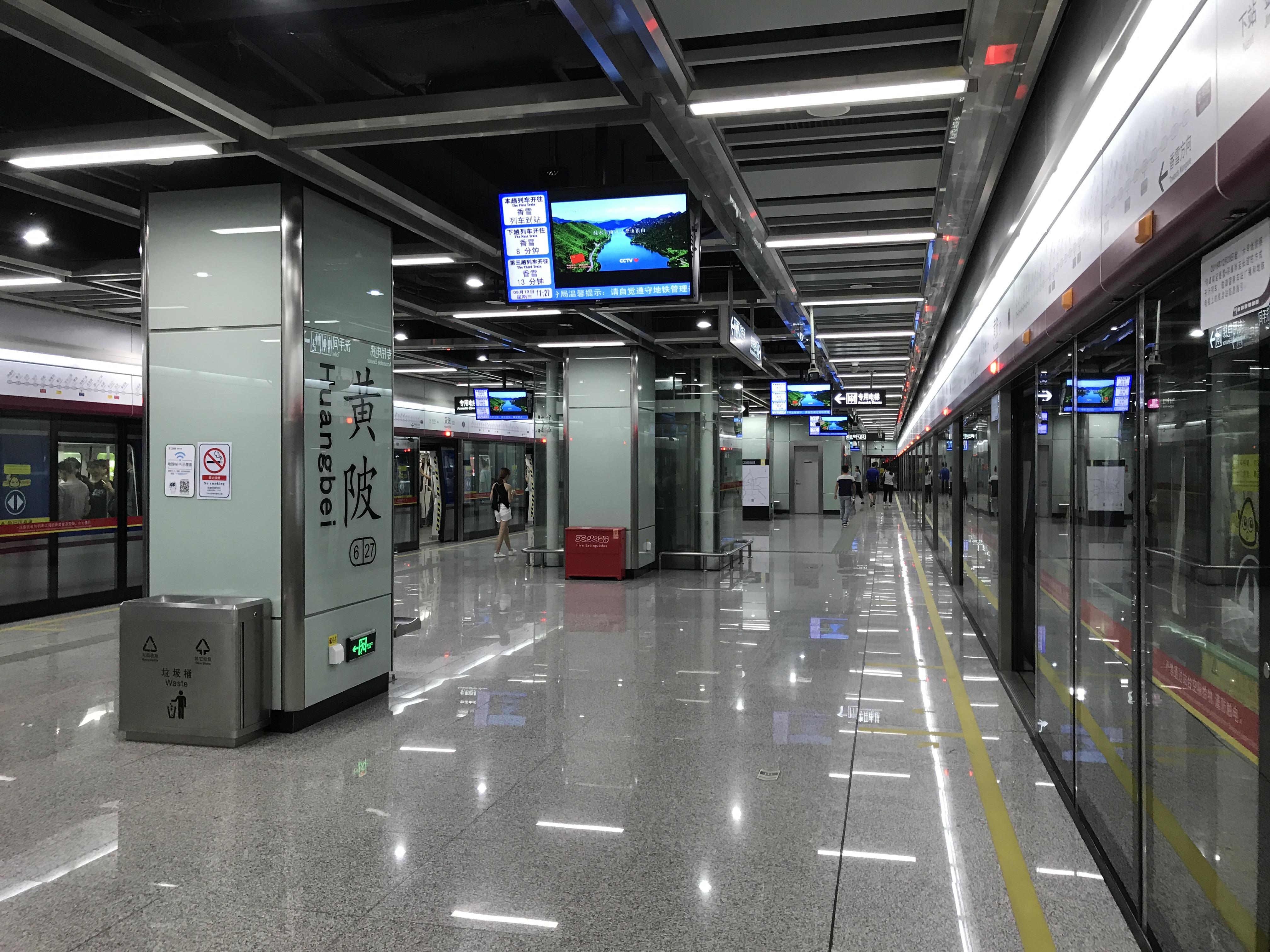 广州地铁黄陂站